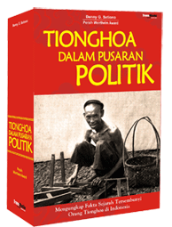 enny G. Setiono adalah peraih Weirtheim Award tahun 2008. Weirtheim Award diberikan kepada mereka yang telah berkontribusi terhadap usaha Emansipasi Nasion Indonesia dalam arti yang seluas-luasnya. Hasil studi dan analisisnya yang terpenting kini diterbitkan kembali oleh TransMedia Pustaka berjudul TIONGHOA DALAM PUSARAN POLITIK. Sebuah buku yang mengungkap fakta sejarah tersembunyi orang Tionghoa di Indonesia.